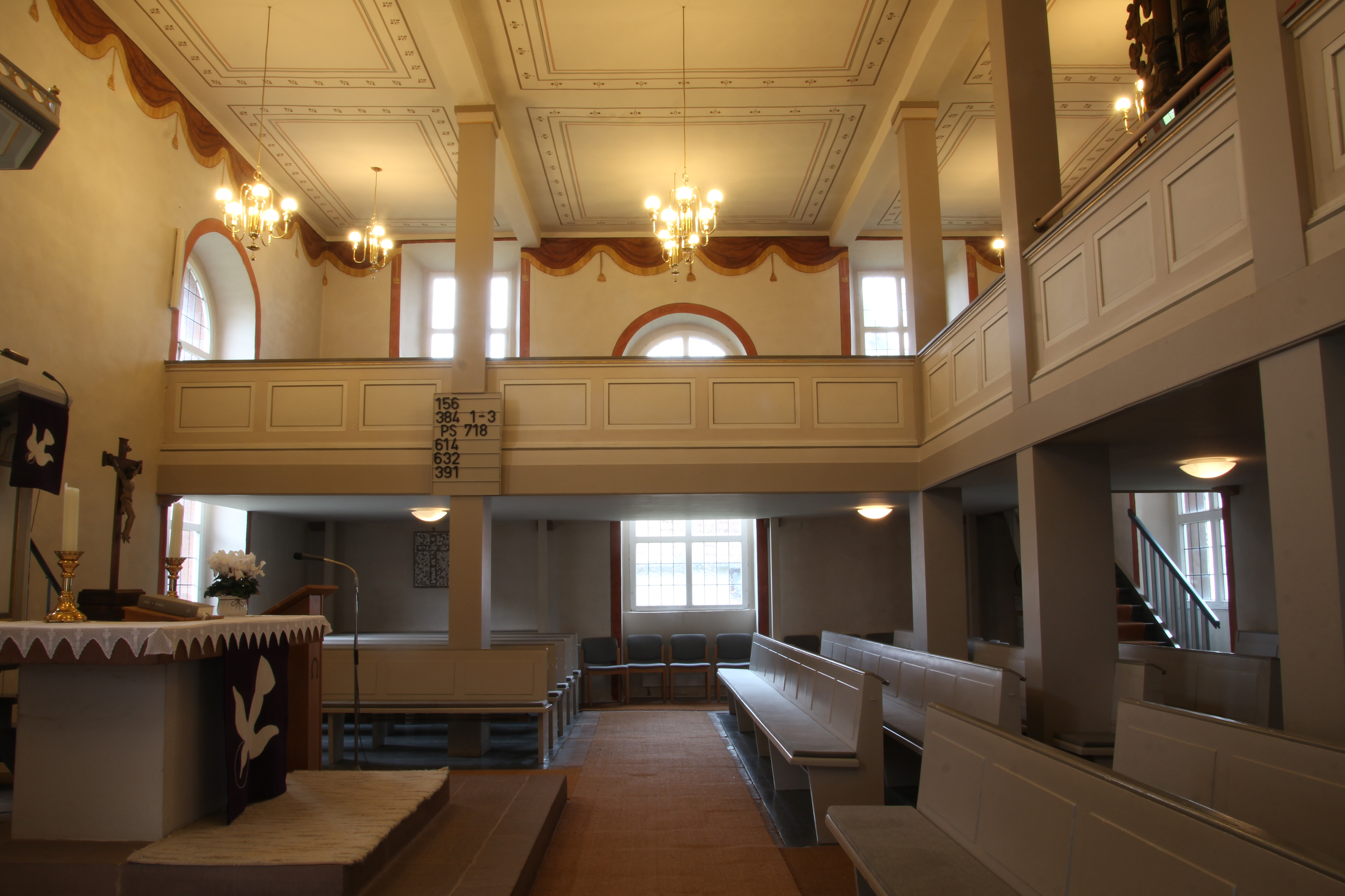 Siehe Bild und Dateiname